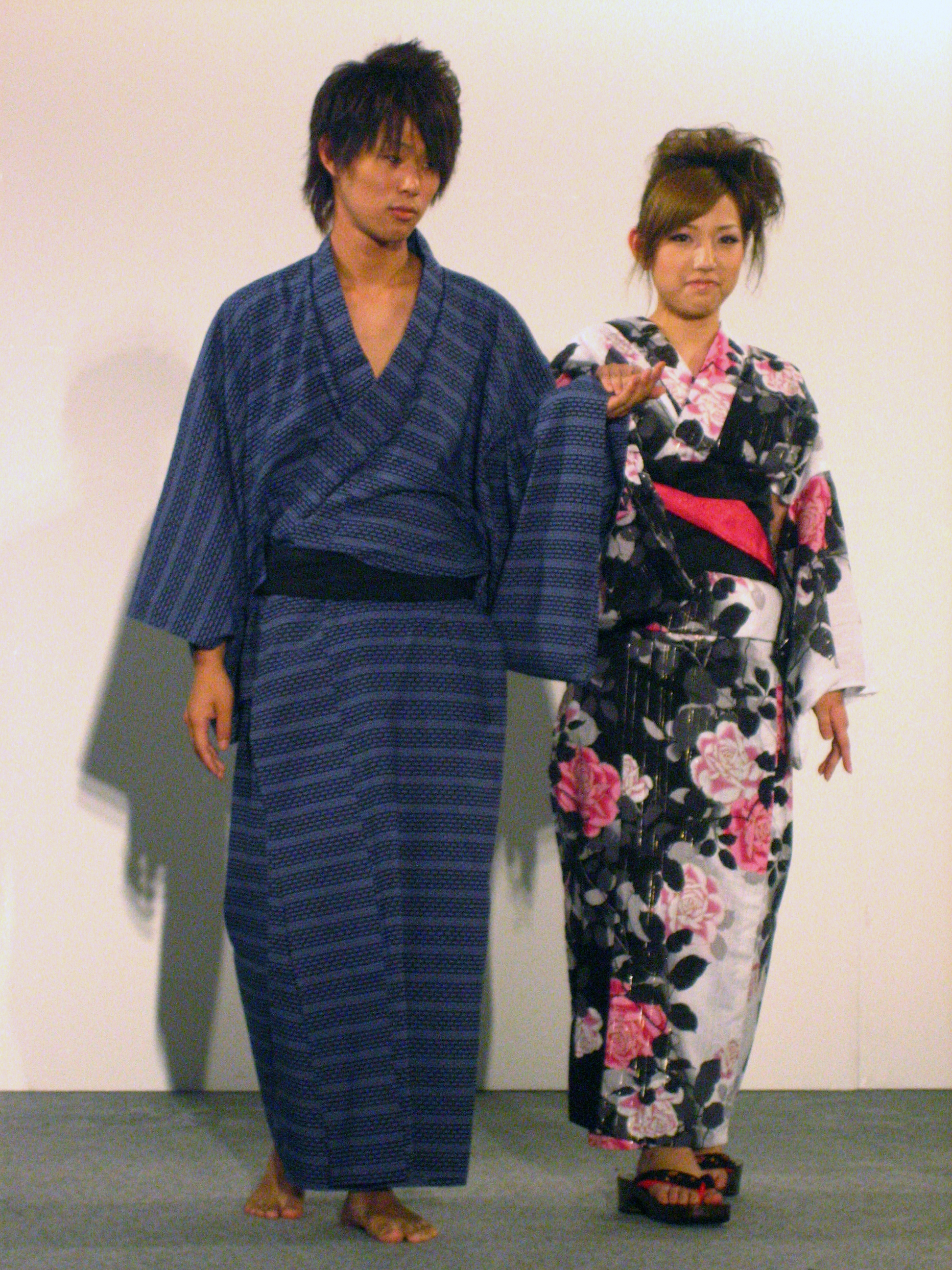 2009年6月22日から23日にかけて、姫路市大手前通りにて開催された「姫路ゆかた祭」。2つ日間にかけて行なわれた祭の風景。注意:ファイル番号及び日時は撮影時系列純にはなっておりません。また、性別、年齢、国籍などによる分類は推定で行なっております。 男女のゆかた衣装。